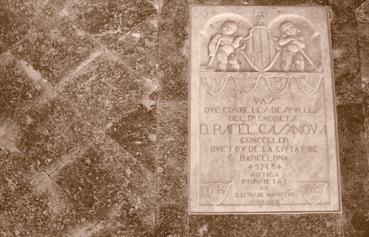 Vas sepulcral de Rafael Casanova a l'església de Sant Baldiri a Sant Boi de Lobregat